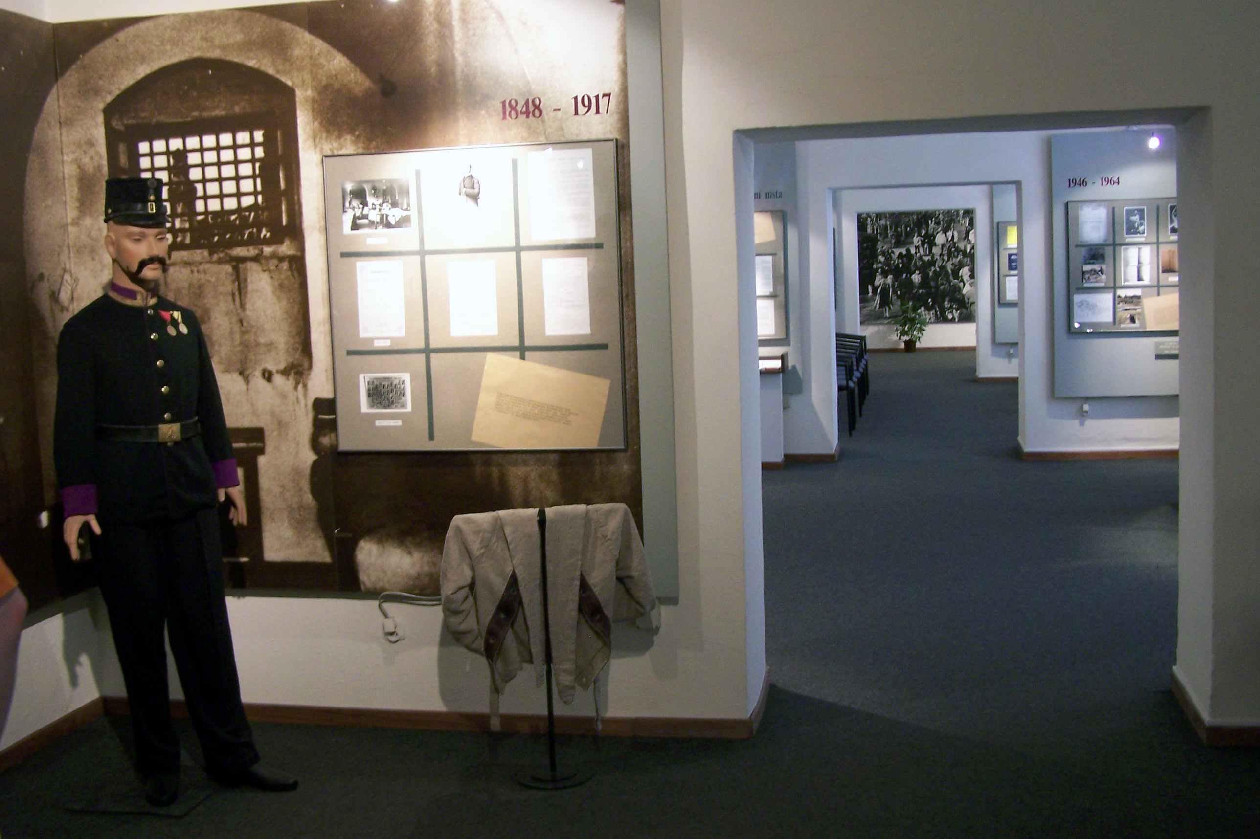 Expozice Památníku Pankrác se nachází v prostorách společných cel smrti z doby nacismu.